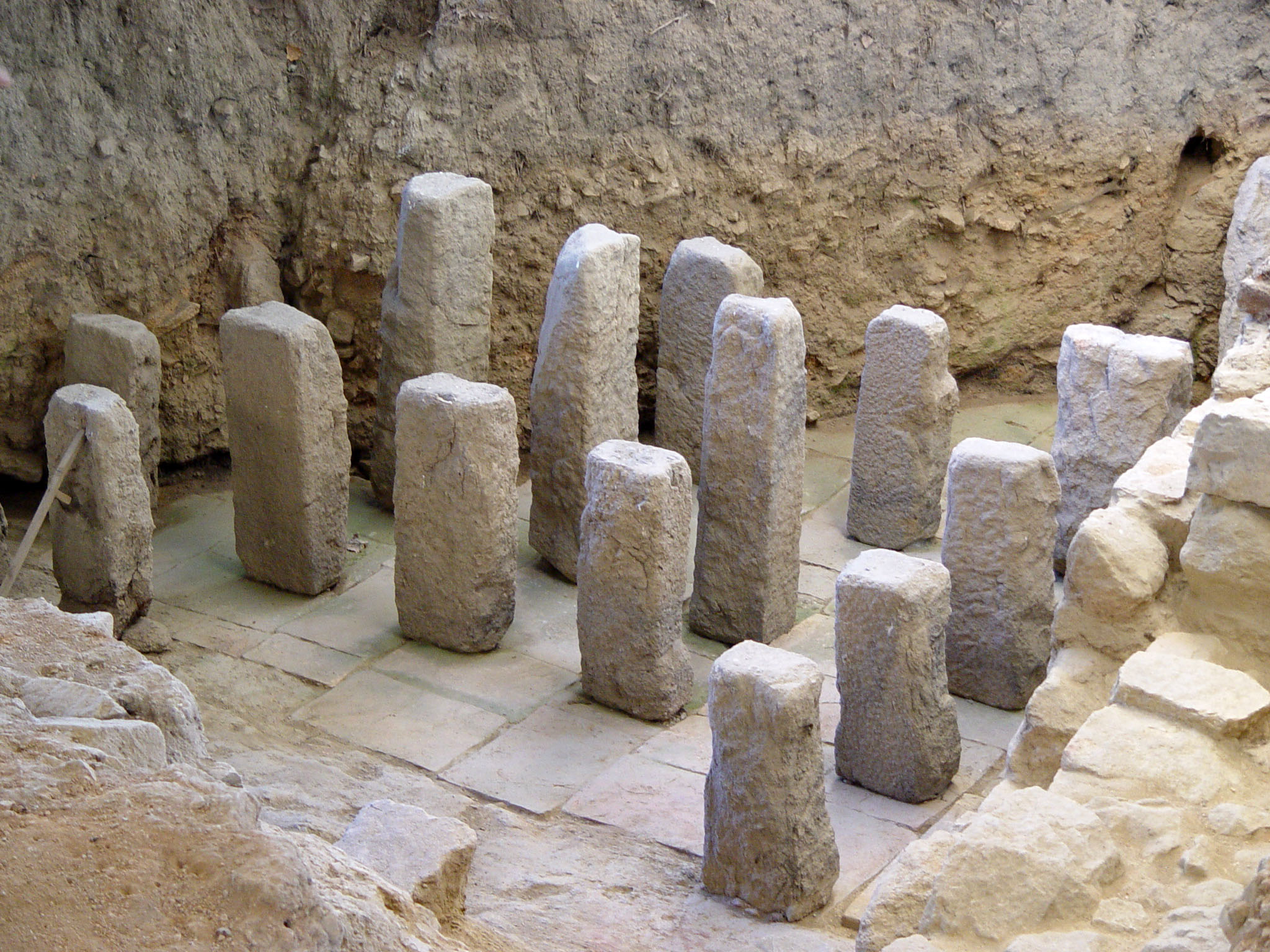 Villa Romana de Sendim construída durante o século IV. Aqui podem observar-se os vestígios dos muros dos vários compartimentos, pavimentos em opus signinum e mosaicos policromados com motivos geométricos. Os trabalhos de arqueologia iniciaram-se na década de oitenta do século XX, aquando da sua descoberta. O espólio exumado nas escavações arqueológicas é muito variado, sendo constituído por milhares de fragmentos de cerâmicas de utilização comum na cozinha e na mesa, cerâmicas de luxo, vidros, metais e moedas de bronze.